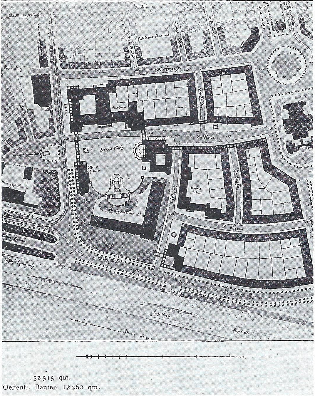 Der Bebauungsplan der Denkmalzone Albinistraße von Friedrich Pützer (1871–1922)